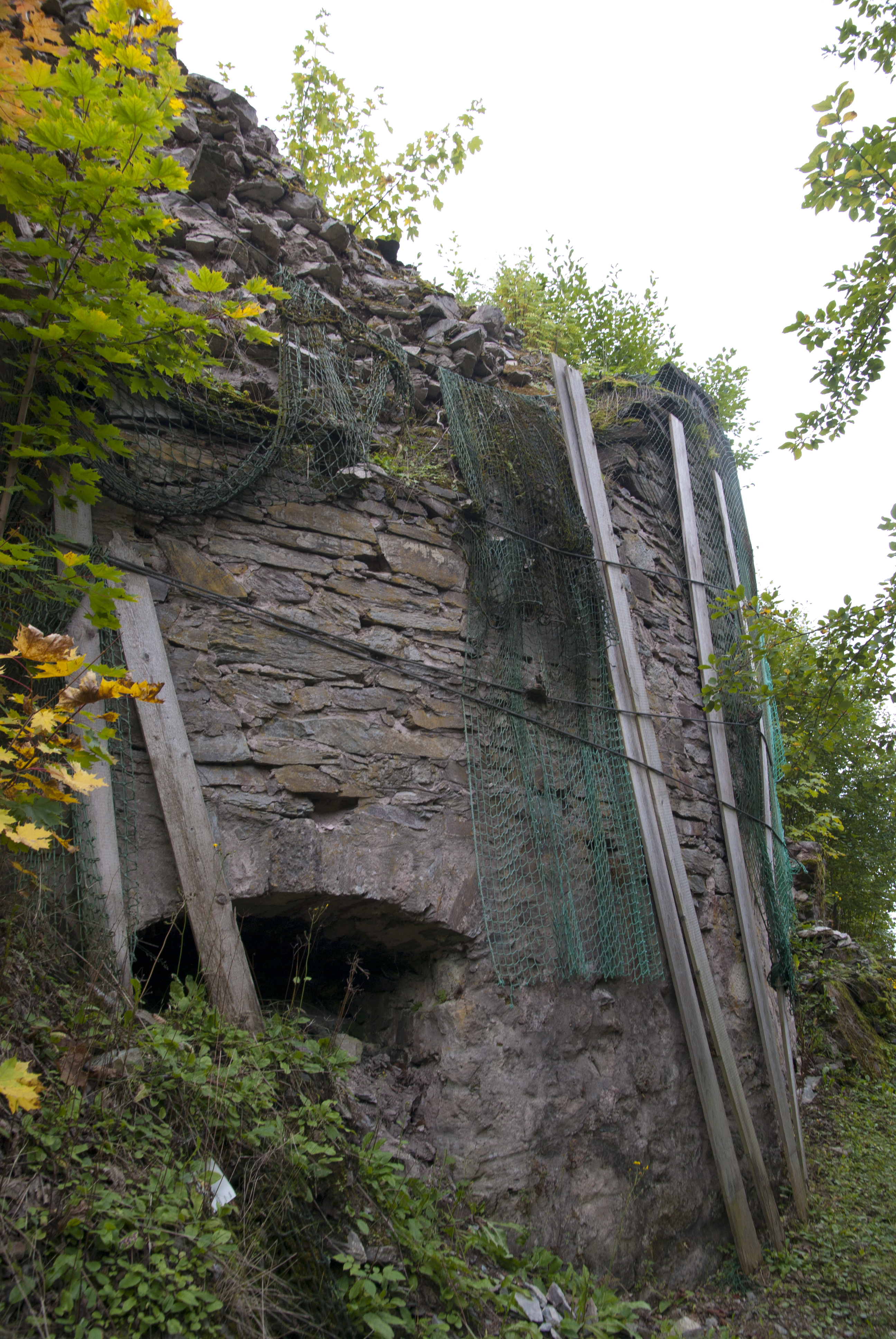 Burgruine Rauenstein in Effelder-Rauenstein in Thüringen